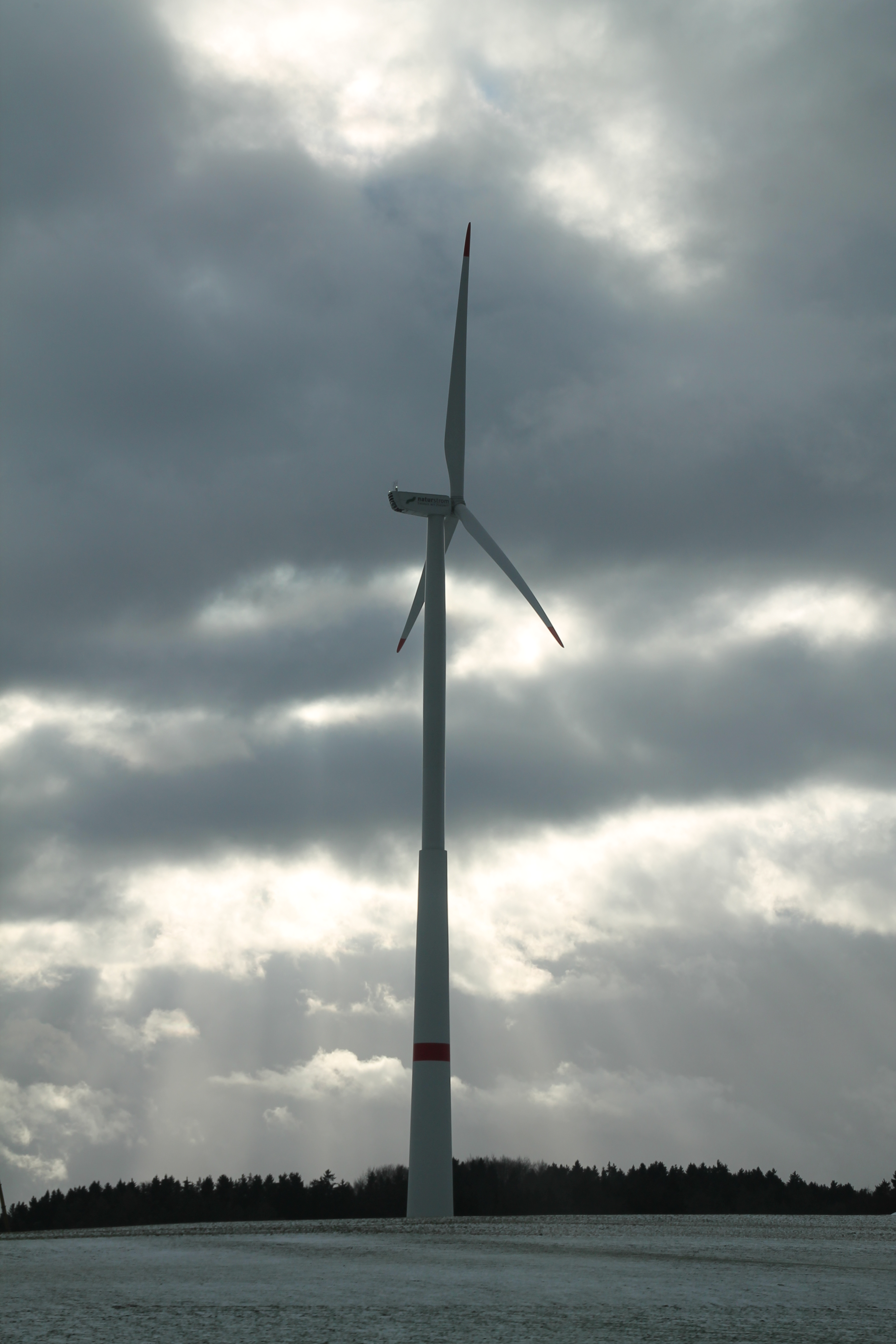 Windpark Uengershausen. Fertiges Windrad des Types N100 von Nordex.